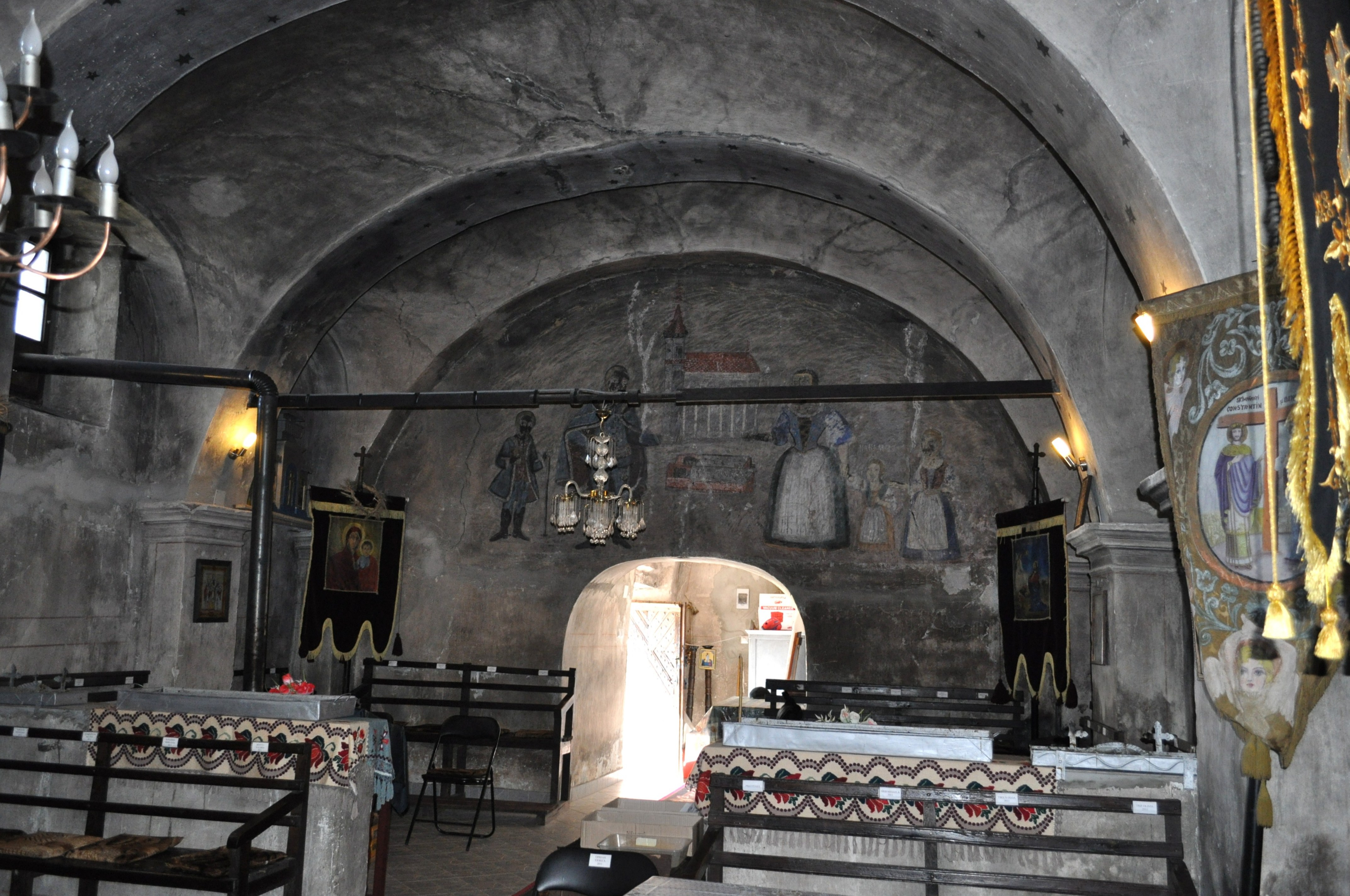 Biserica "Buna Vestire", sat ROŞCANI; comuna DOBRA